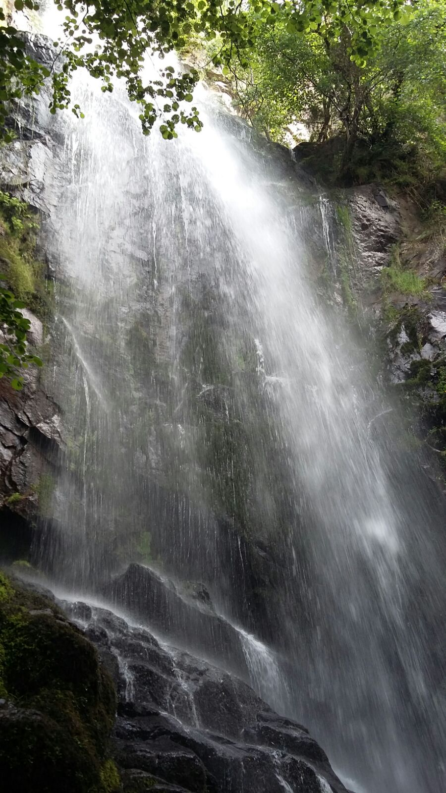 Fervenza de Augacaída en Pantón